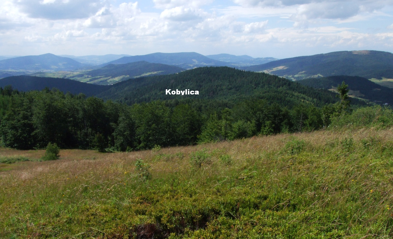 Beskid Wyspowy, Widok z polany Jasień. Na dole Kobylica, u góry Ogorzała, Szczebel, Lubogoszcz, Ćwilin